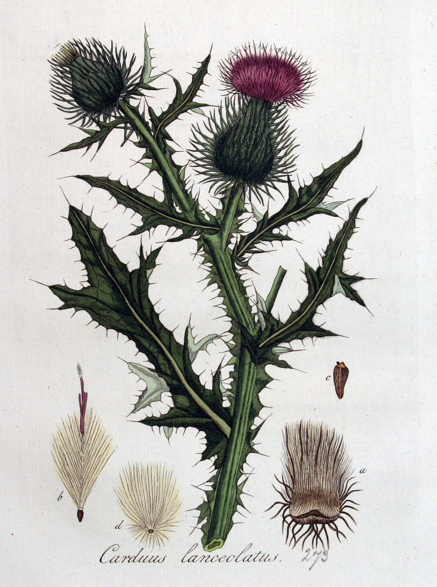 Cirsium vulgare (Savi) Ten. (Syn. Carduus lanceolatus L.)